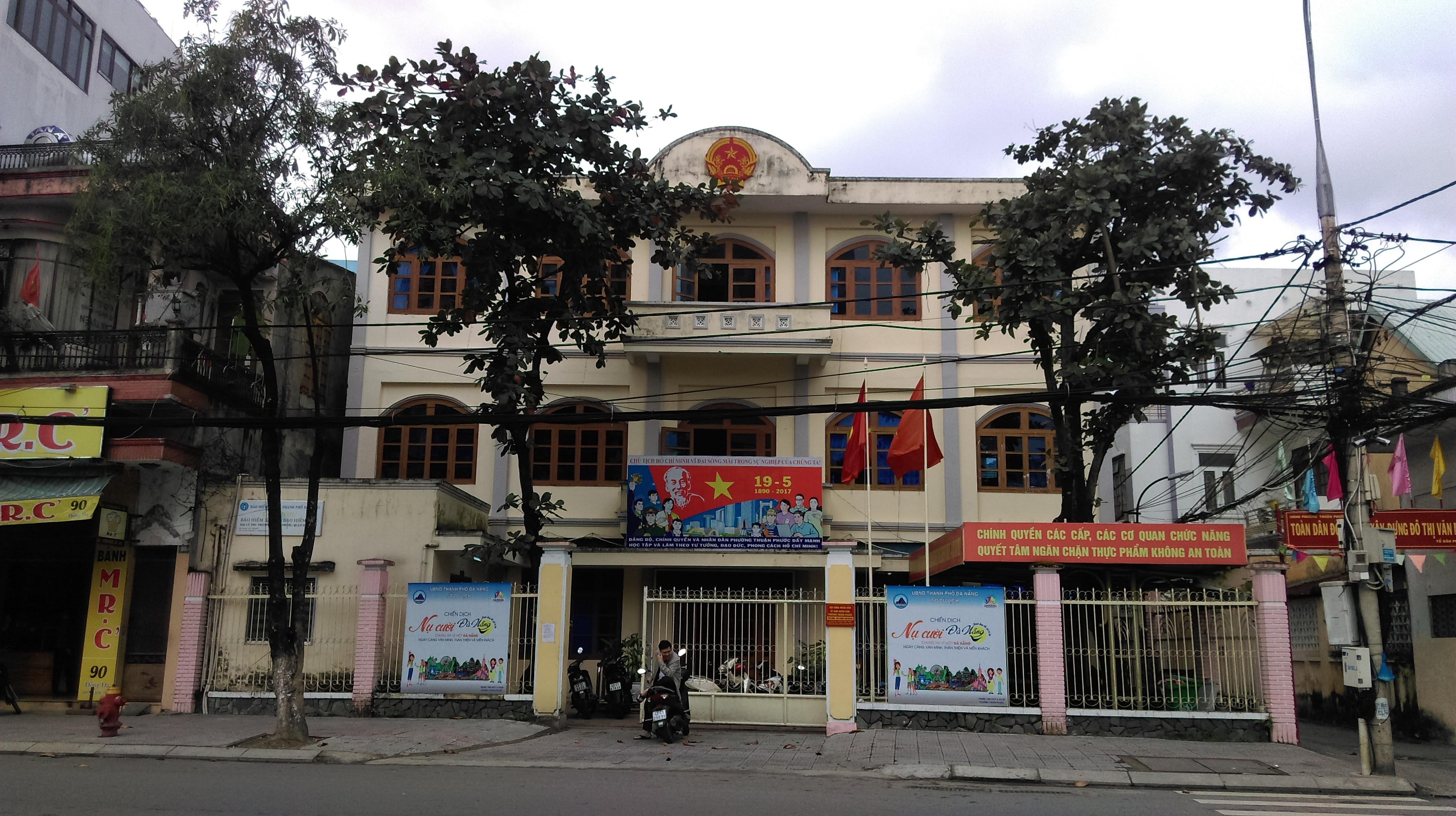 UBND phường Thuận Phước, Hải Châu, Đà Nẵng